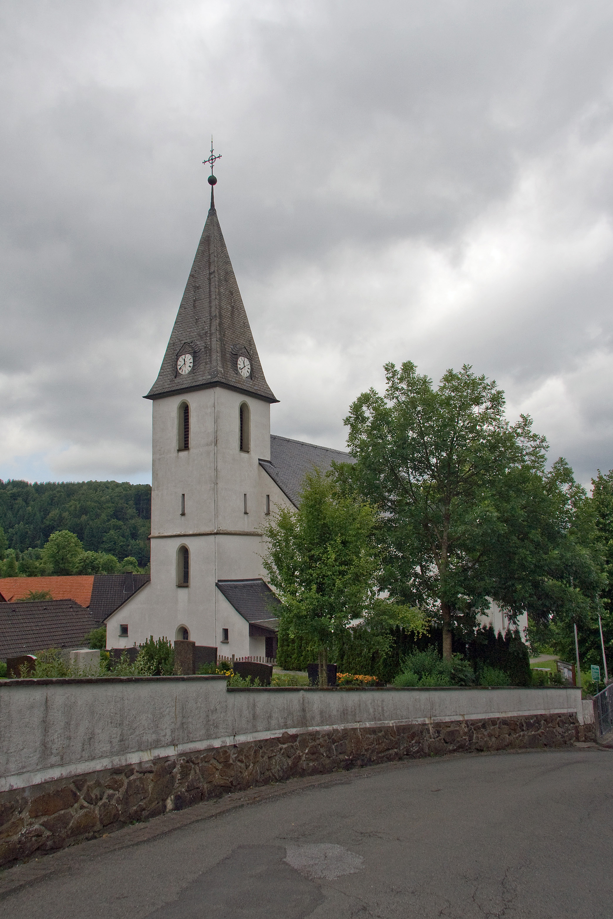 St.-Vitus-Kirche in Brilon-Bontkirchen